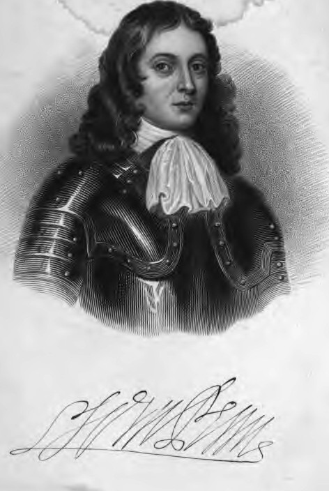 William Penn (1644-1718)